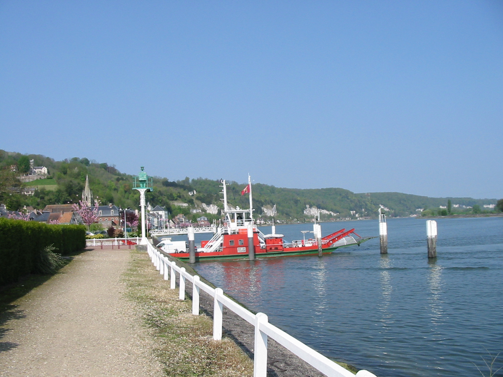 Le bac permet à des piétons, mais aussi à des automobilistes, de traverser un fleuve (ici la Seine).